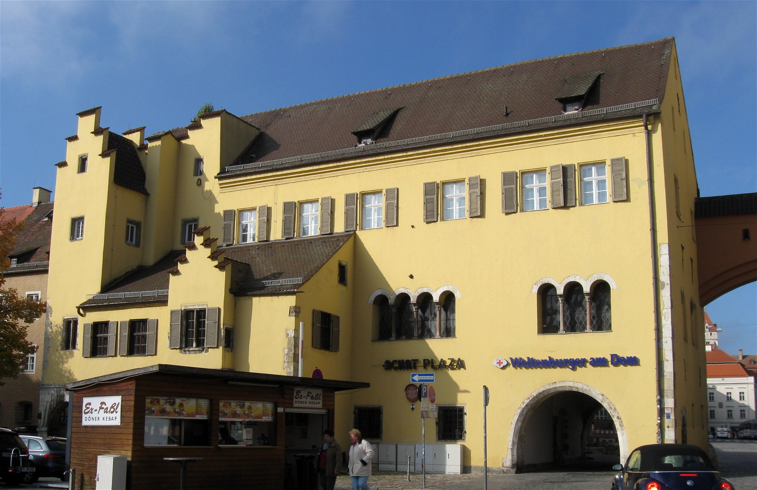 Alter Kornmarkt 10; Ostflügel des ehem. Herzogshofs, erste Residenz der Wittelsbacher Herzöge in Bayern, später Teil der Oberpostdirektion; dreigeschossiger, zum Alten Kornmarkt traufständiger Satteldachbau mit Pultdach- und Giebelanbauten, mit sog. Kapelle und Herzogssaal, im Kern spätes 12. Jh., um 1220 umgebaut, 1937 durch Schwibbogen mit dem Römerturm verbunden, Umgestaltung 1939-40; mit Ausstattung